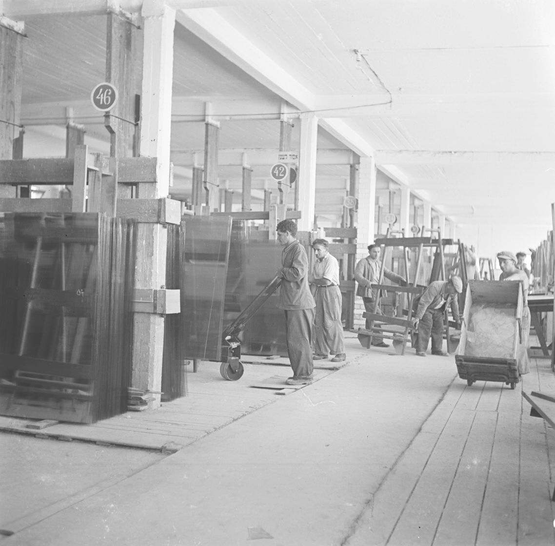 אוסף צילומים של הצלם זולטן קלוגר טווח מספרי התשלילים 30185A - 30223: בית החרושת "פניציה", מפרץ חיפה